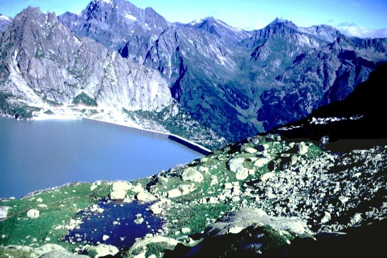 Albignasee